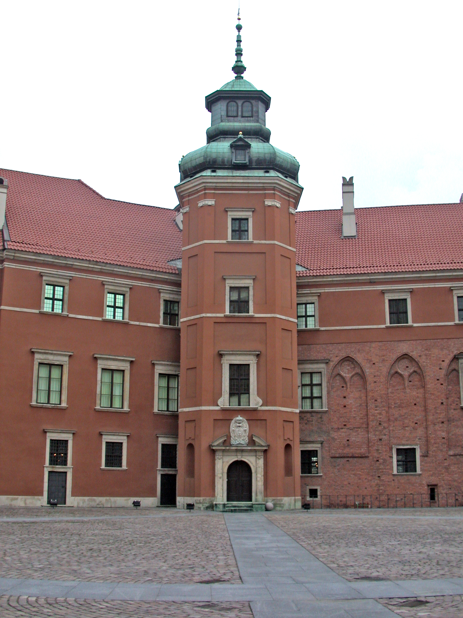 Varsavia, Castello Reale (Zamek Królewski), Cortile interno, Torre di Ladislao (1571 e 1637-1643).